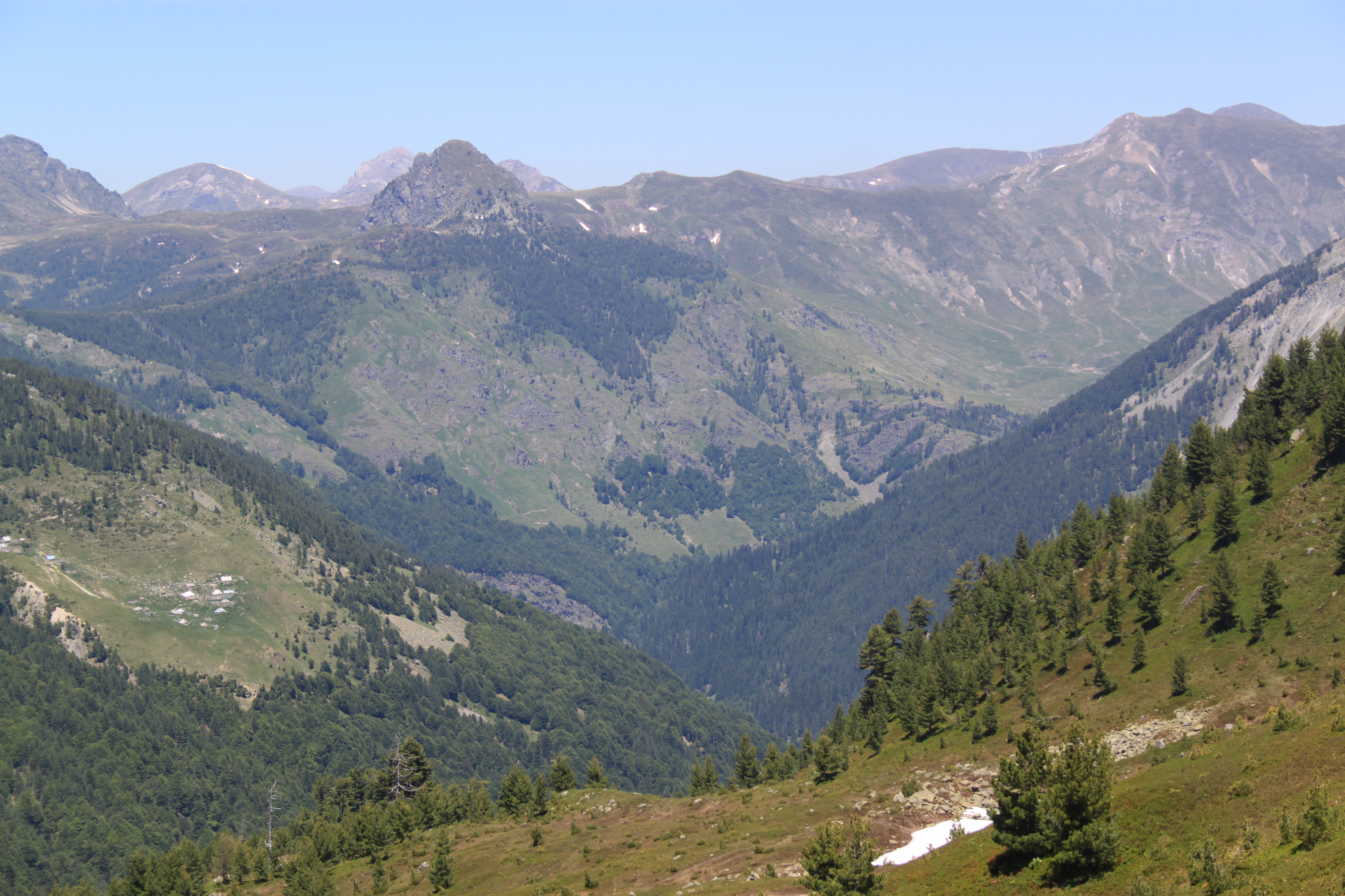 Në qendër të pejsazhit është nje pjesë e Luginës së Gashit Park Kombëtar i kategorisë së parë rezervë strikte